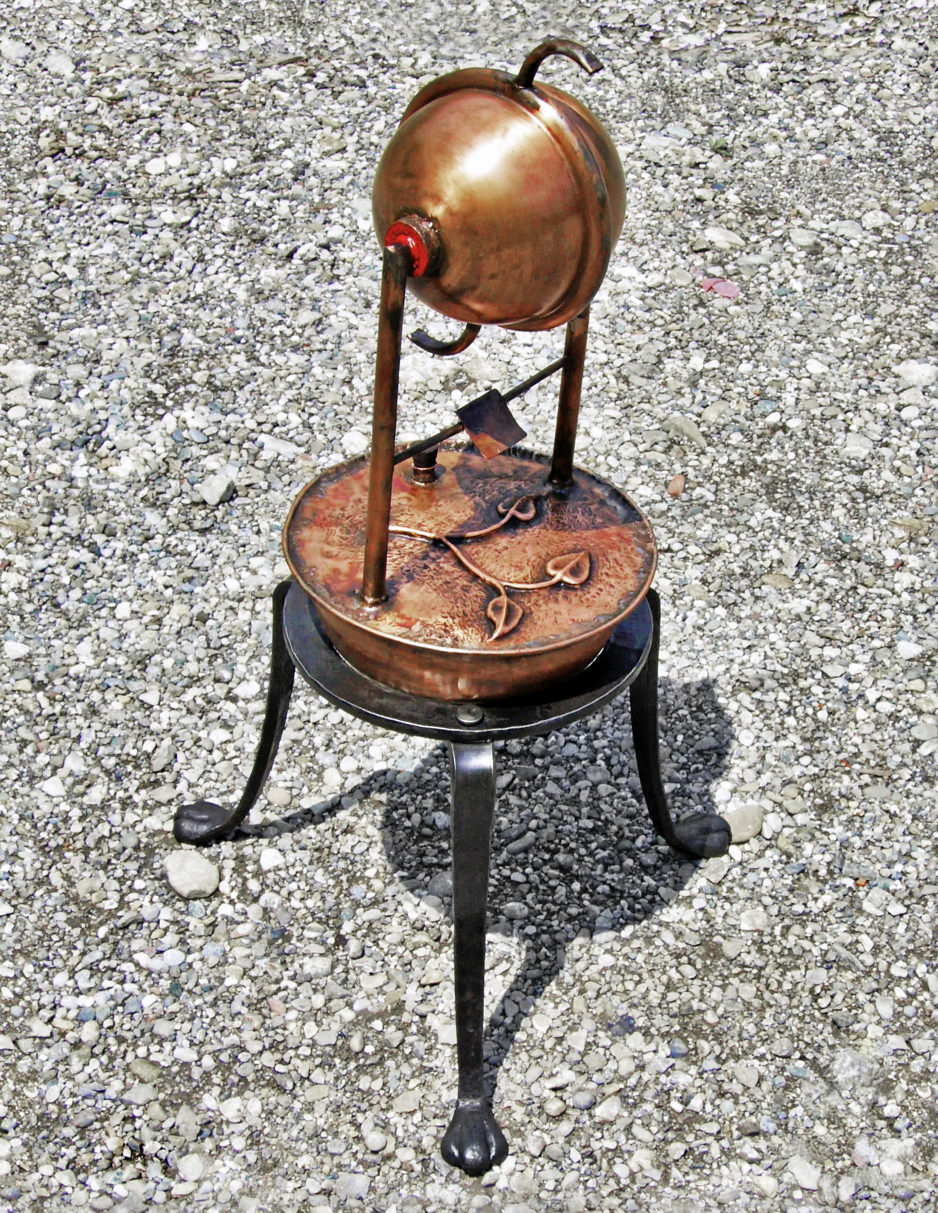 Nachbau eines Heronsball mit geschmiedeten Füßen